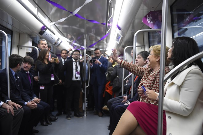 Inauguración de la Línea 6 del Metro de Santiago por la presidenta Michelle Bachelet y otras autoridades.